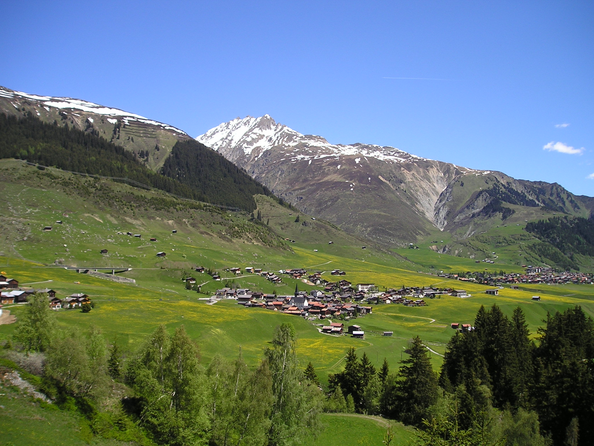 upper Surselva near Sedrun/obere Surselva von der Oberalp-Passstrasse her